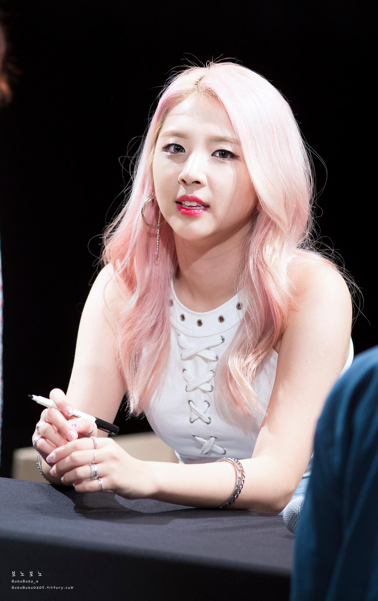 170730 KARD 강남 팬싸인회